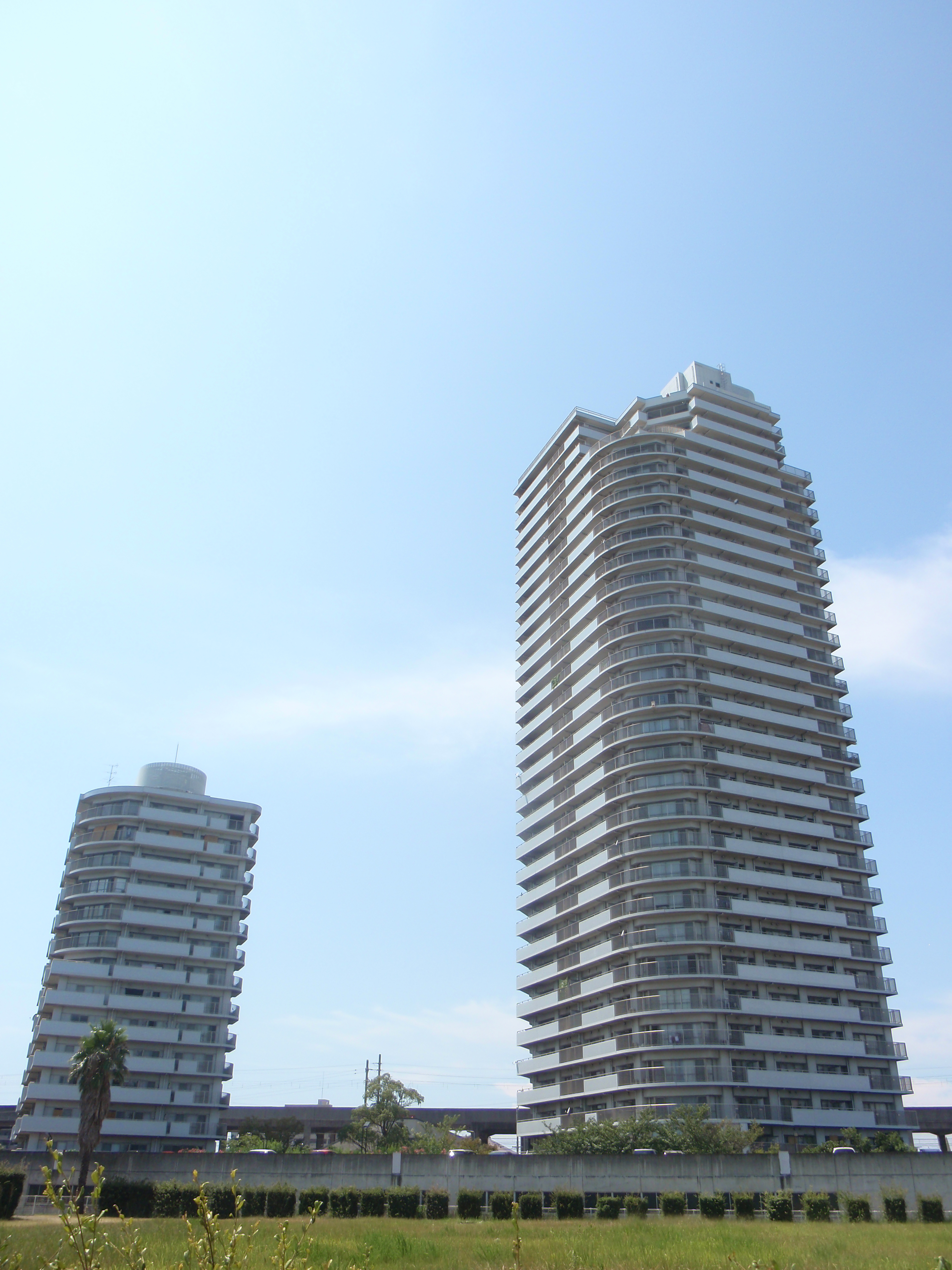 香川県綾歌郡宇多津町にあるタワーマンション「ツインタワー瀬戸大橋」。